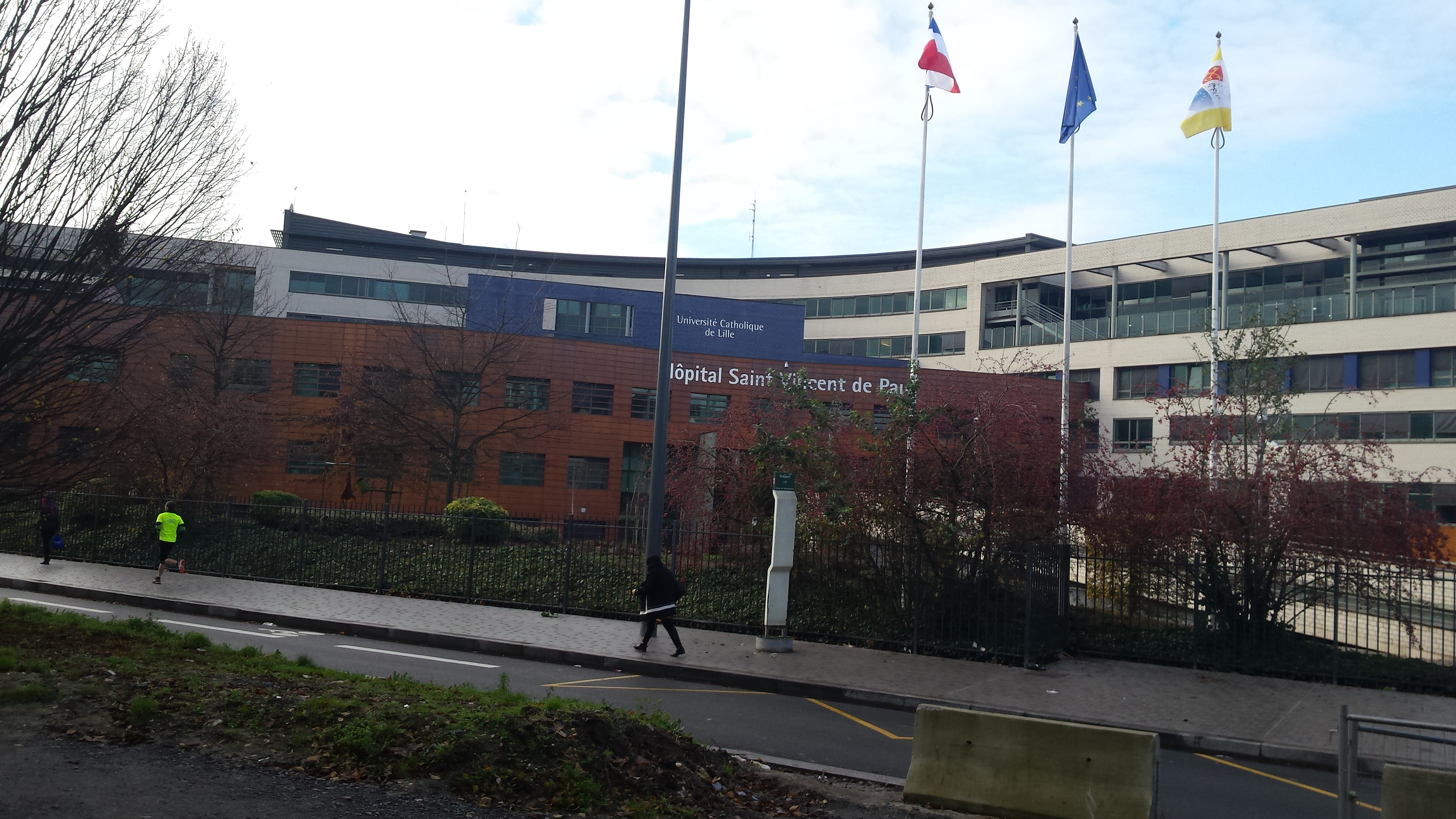 Vue sur l'hôpital Saint-Vincent de Paule à Lille, en décembre 2014.